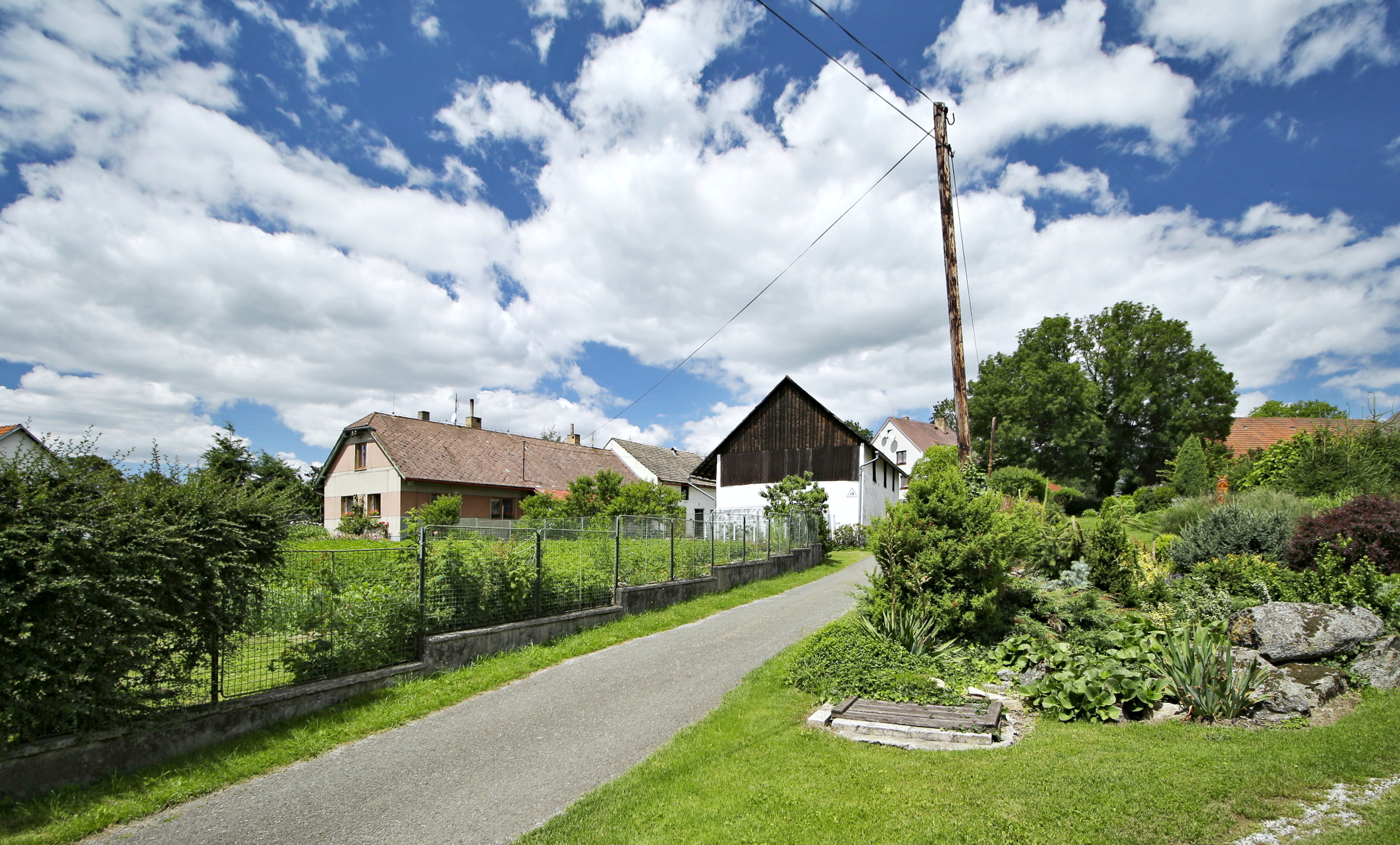 Nosetín